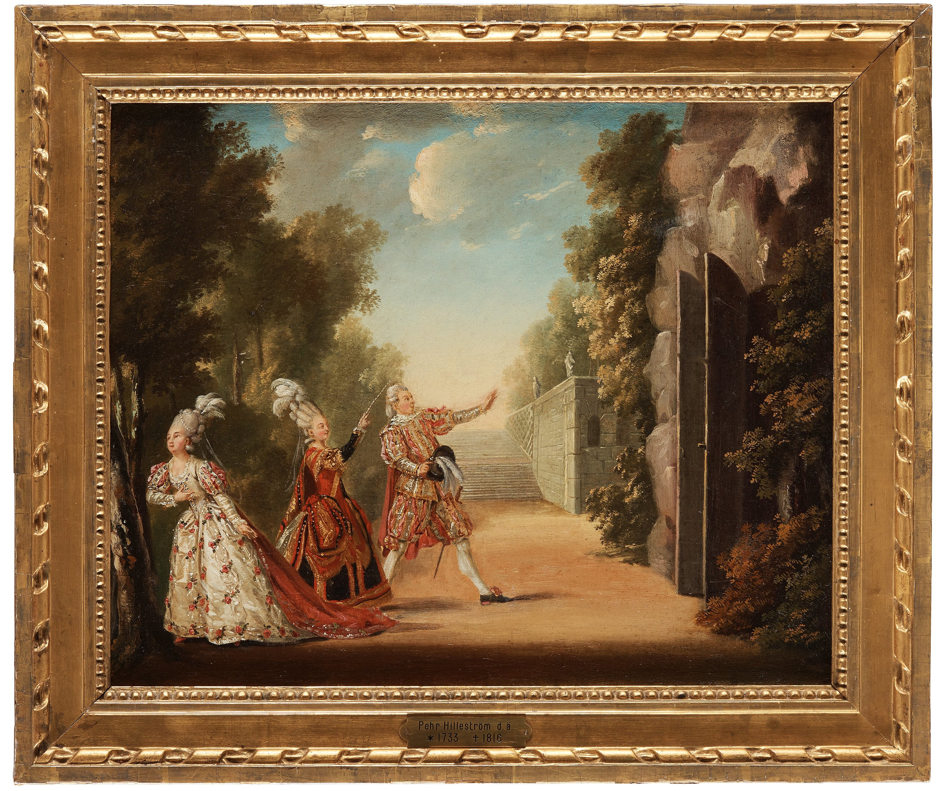 Scen ur La Belle Arsène - Akt III Scen VIII av Pehr Hilleström år 1779. på Baksidan står det Fru Baptiset, Fru Ohlin och K Karsten i operan Arsène. Afbildad och bekrifven av j Flodmark i Ny JLL Tidning N23 1898.